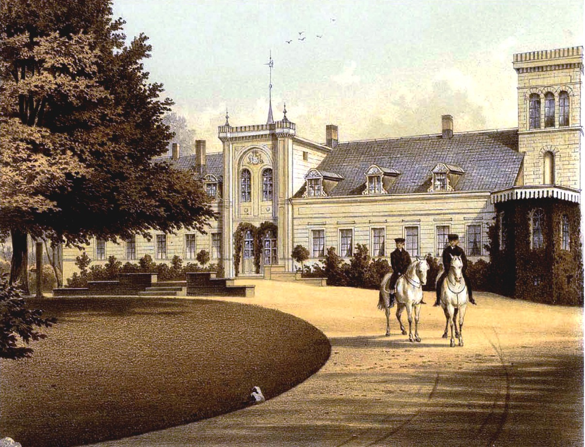 Rittergut Schönwerder A, Kreis Pyritz, Provinz Pommern